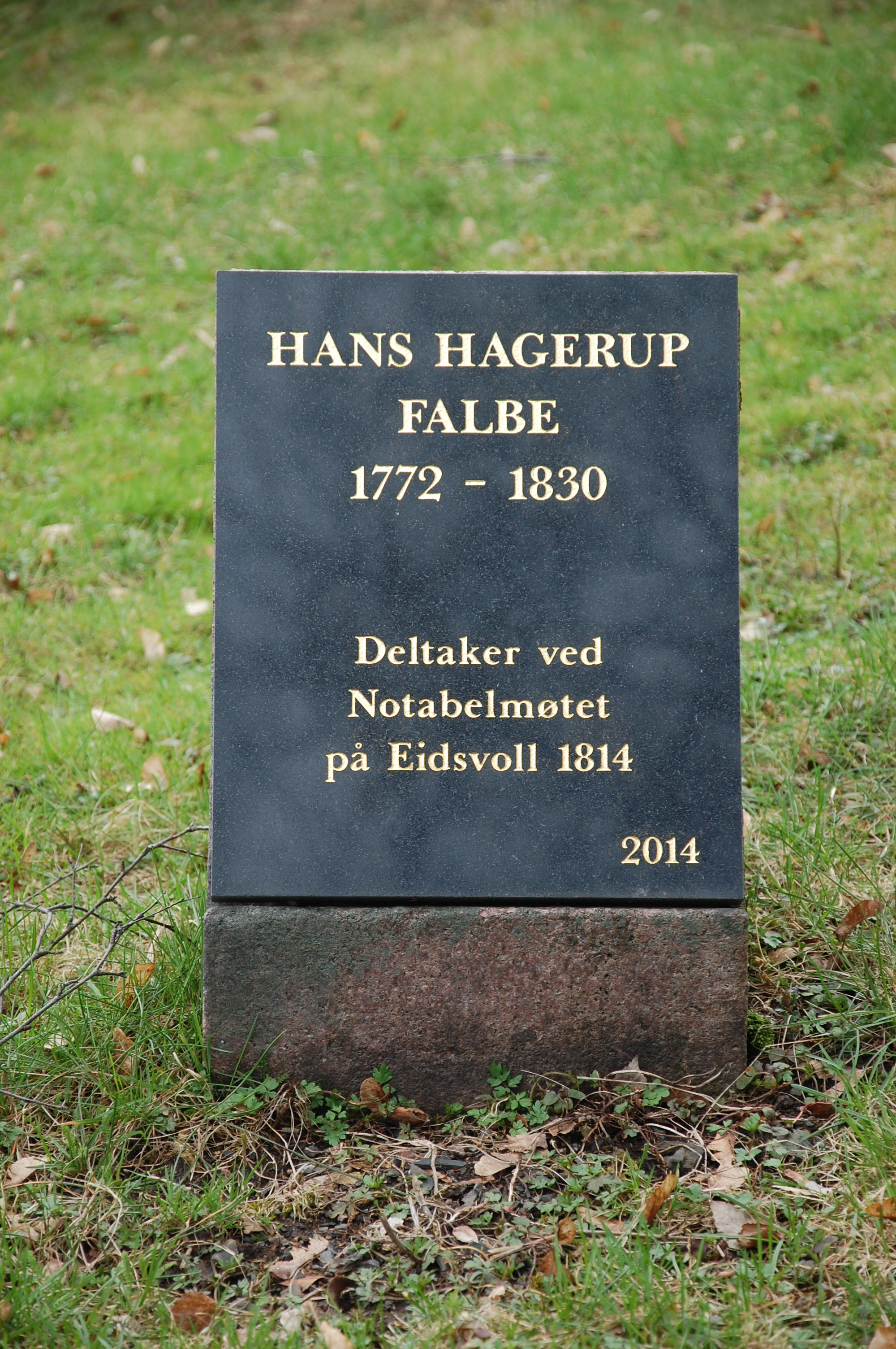 Hans Hagerup Falbe, gravminne på Vår Frelsers gravlund, Oslo